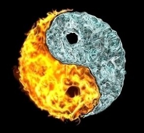 Yin Yang